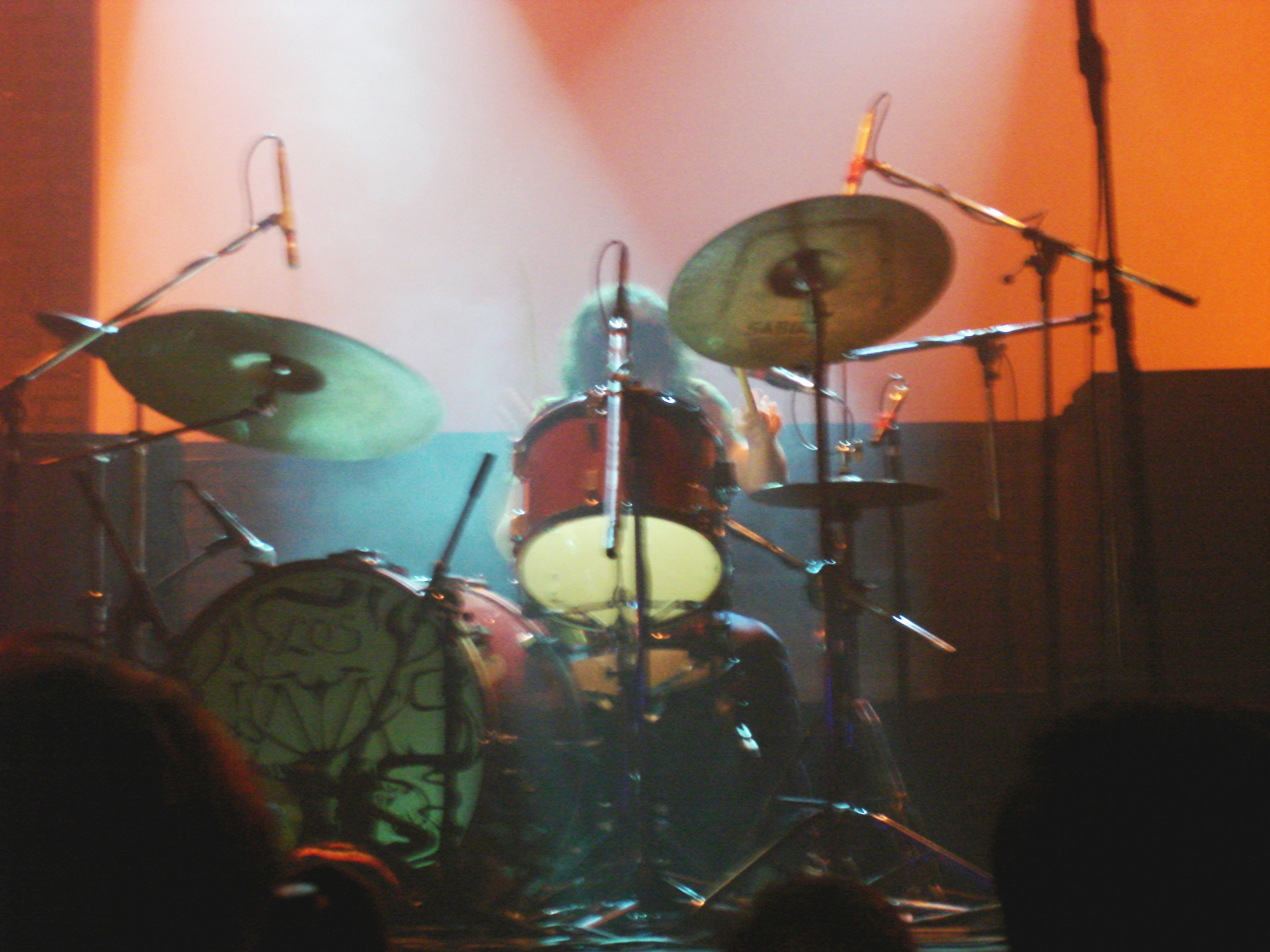 Los Natas en Niceto 18-08-07